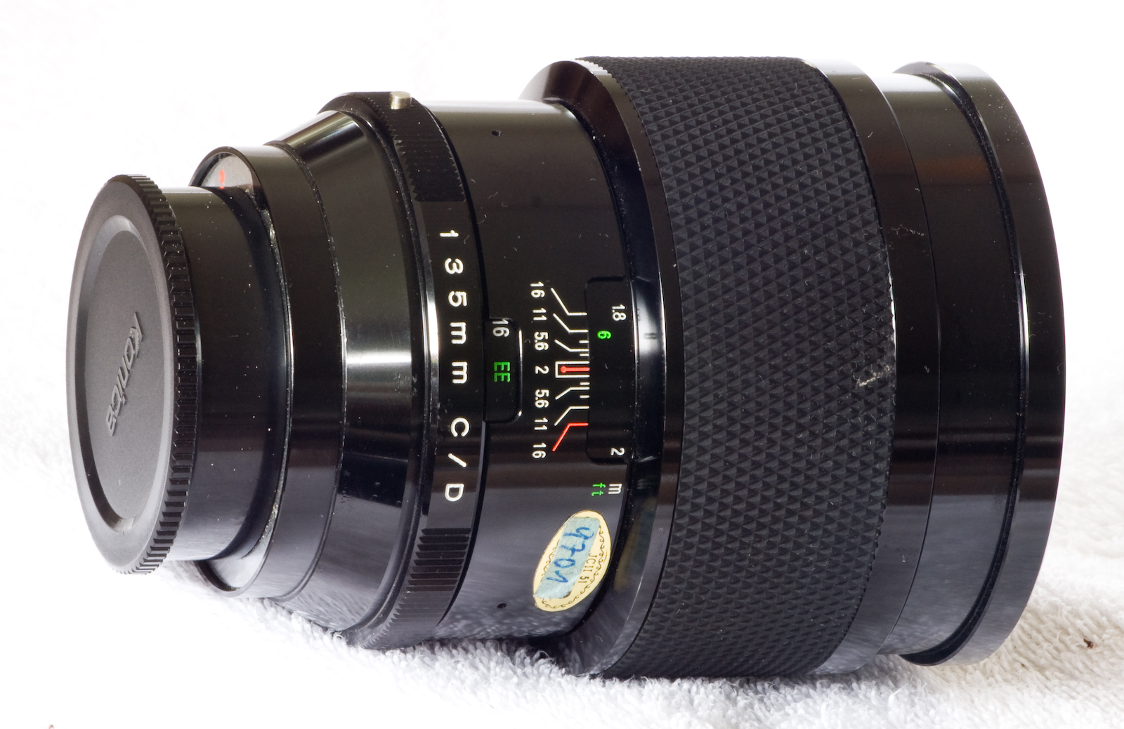 Lens: Soligor 135mm F2.0